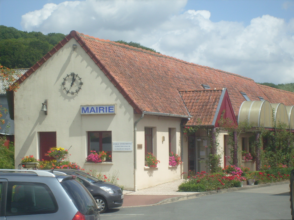 Mairie de Nielles-lès-Bléquin